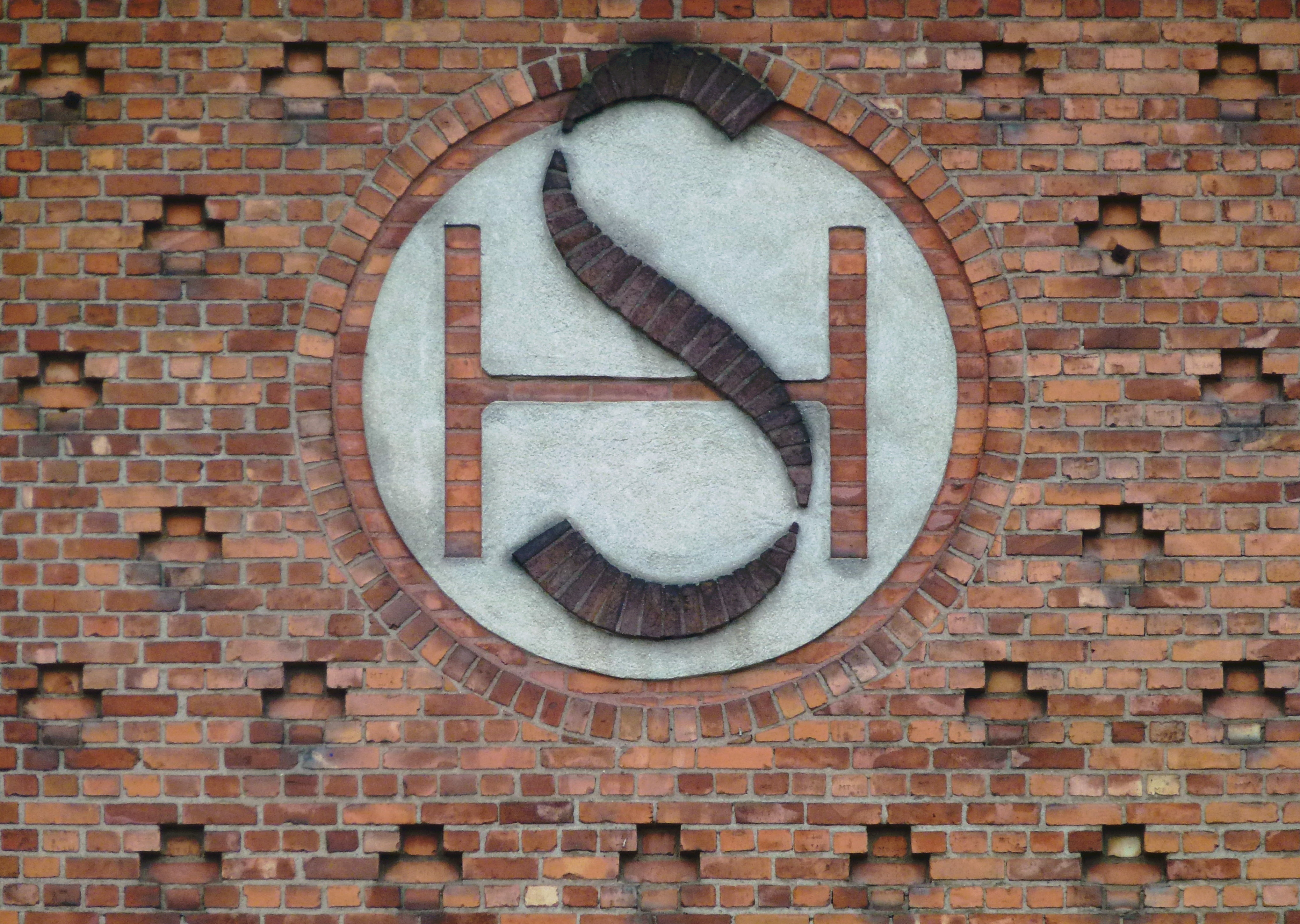 Söderberg & Haaks tidigare fastighet i Marievik "S&H"